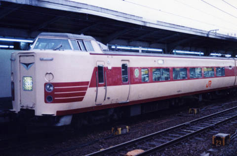 1991年に本人が撮影した写真をスキャン